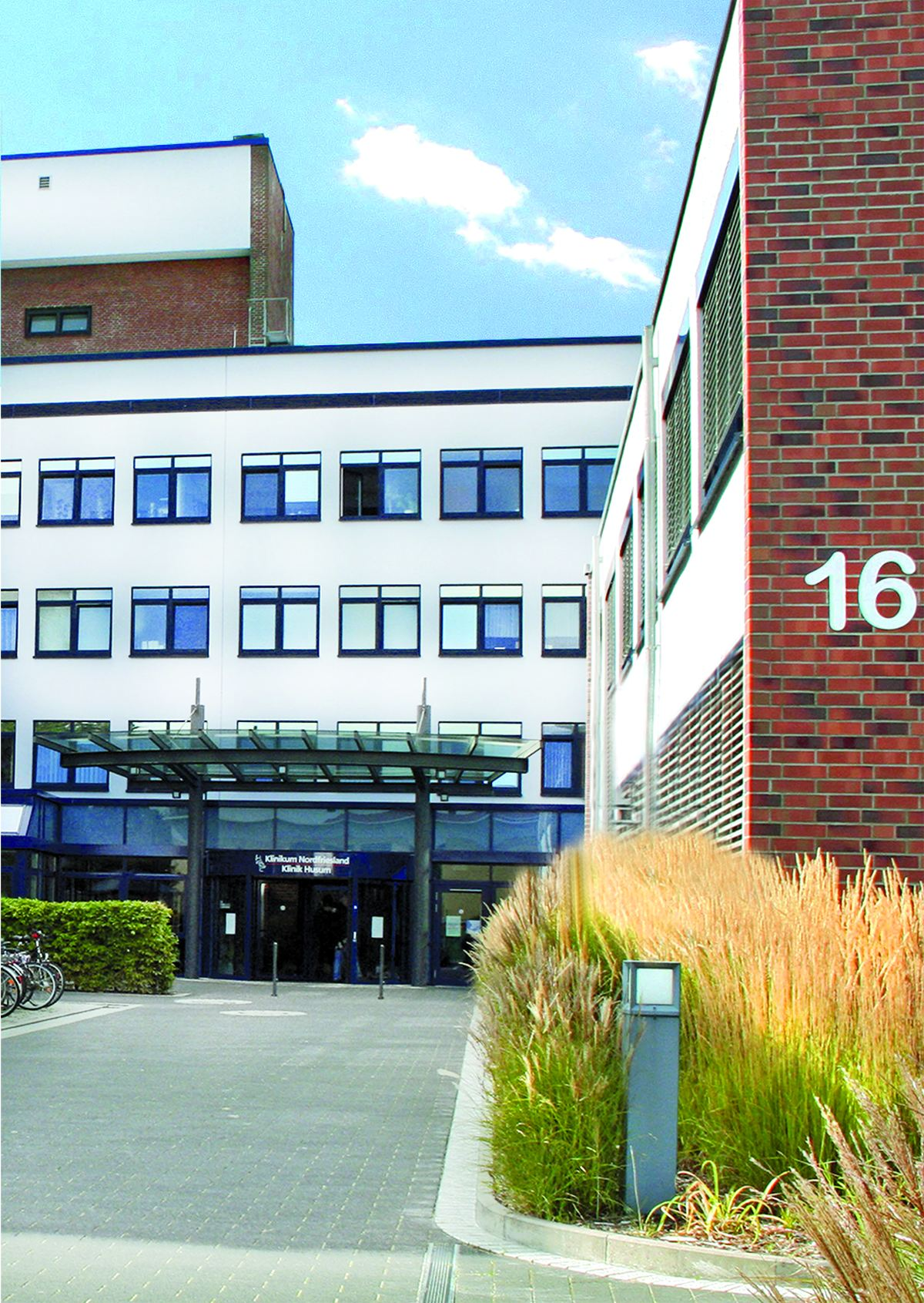 Ansicht von Osten